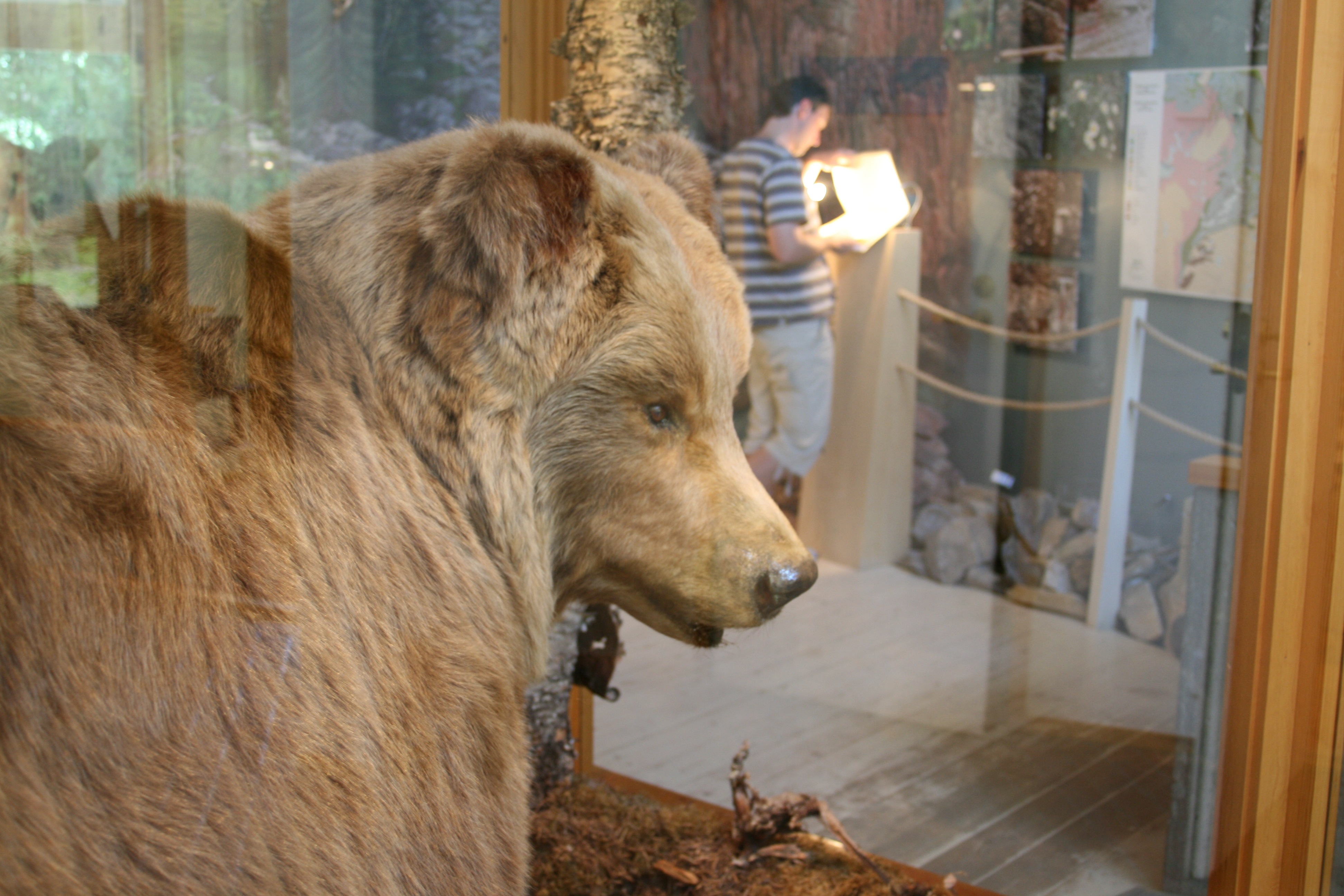 Oulas-nalle on täytetty ruskeakarhu Oulangan luontokeskuksessa